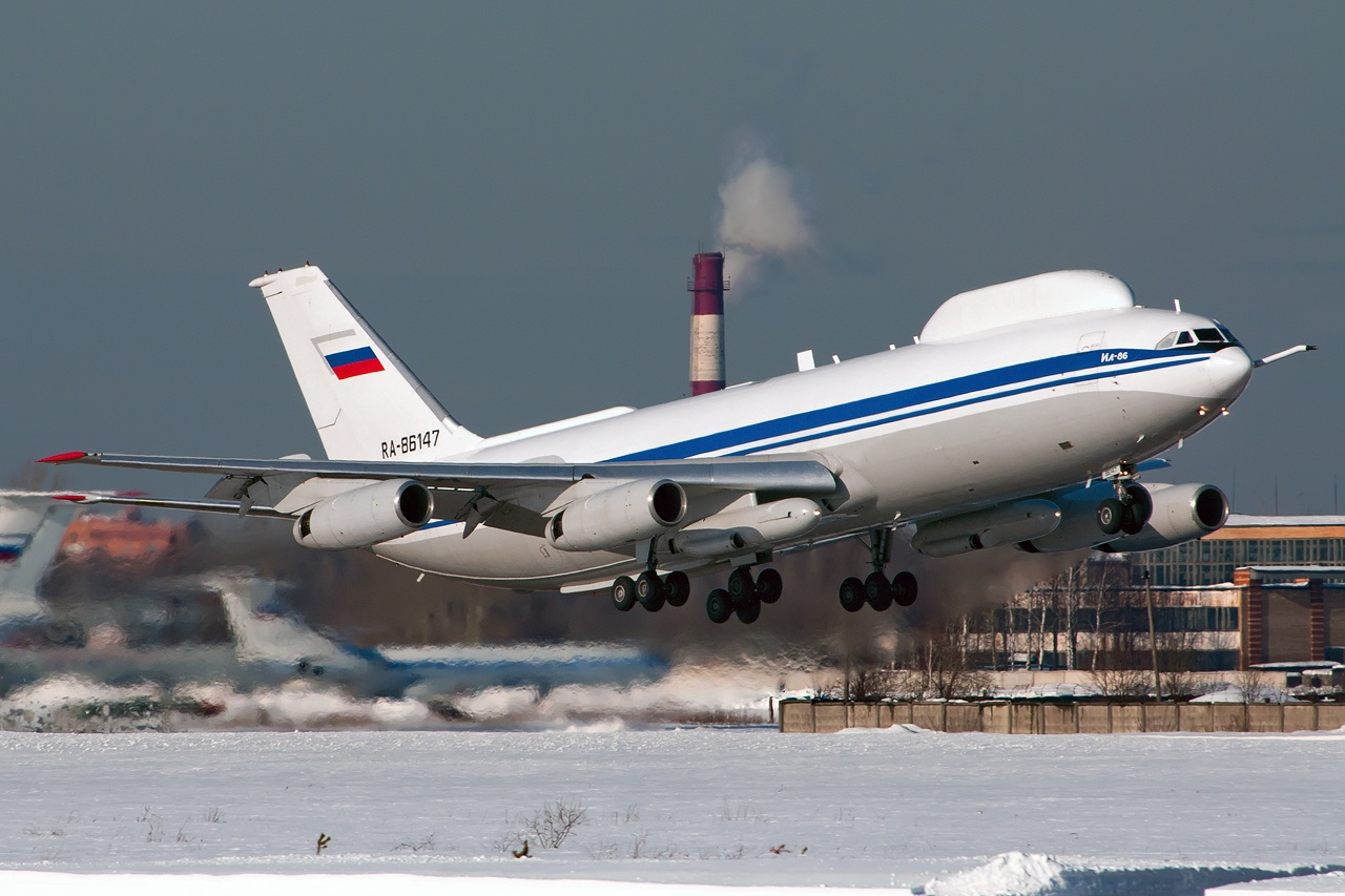 Ilyushin Il-87 Aimak (Il-80/Il-86VKP) Chkalovsky (CKL / UUMU) Russia, March 2011 RA-86147 (cn 51483205043)